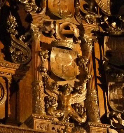 Representación heráldica do reino de Galicia na cheminea do Palais de Franc de Bruges (1528), realizado por Lanceloot Blondeel. Coat of arms of the kingdom of Galicia in the Palais de Franc de Bruges (year 1518).